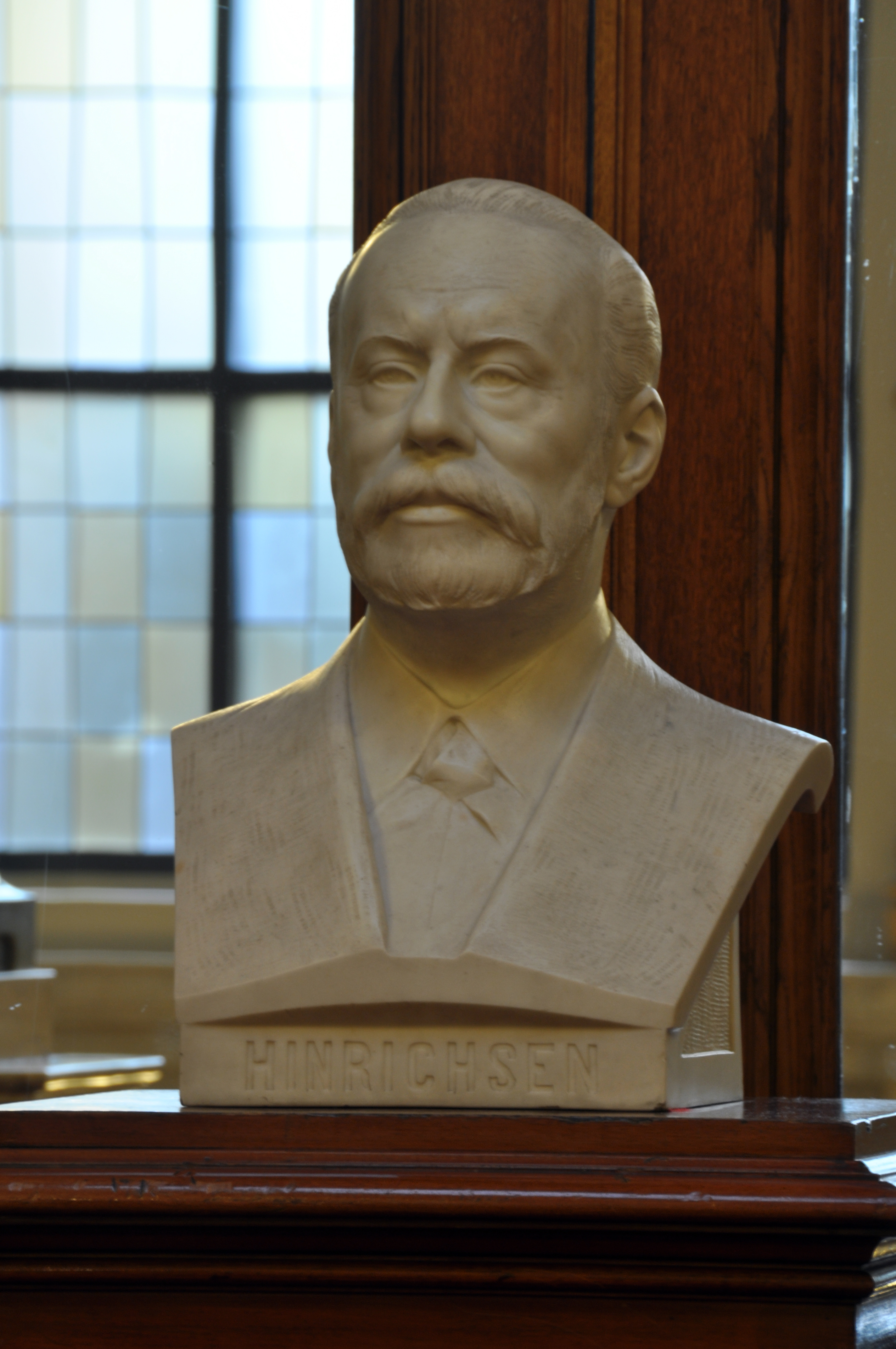 WikiProjekt Hamburgische Bürgerschaft. 22./23. 6. 2011 Fotos aus dem Rathaus. Die Büste des 1902 während der Leitung einer Bürgerschaftssitzung im Amt verstorbenen Bürgerschaftspräsidenten Siegmund Hinrichsen wurde 1904 von Adolf Brütt geschaffen und steht im Bürgersaal des Hamburger Rathauses. This is a photograph of an architectural monument.